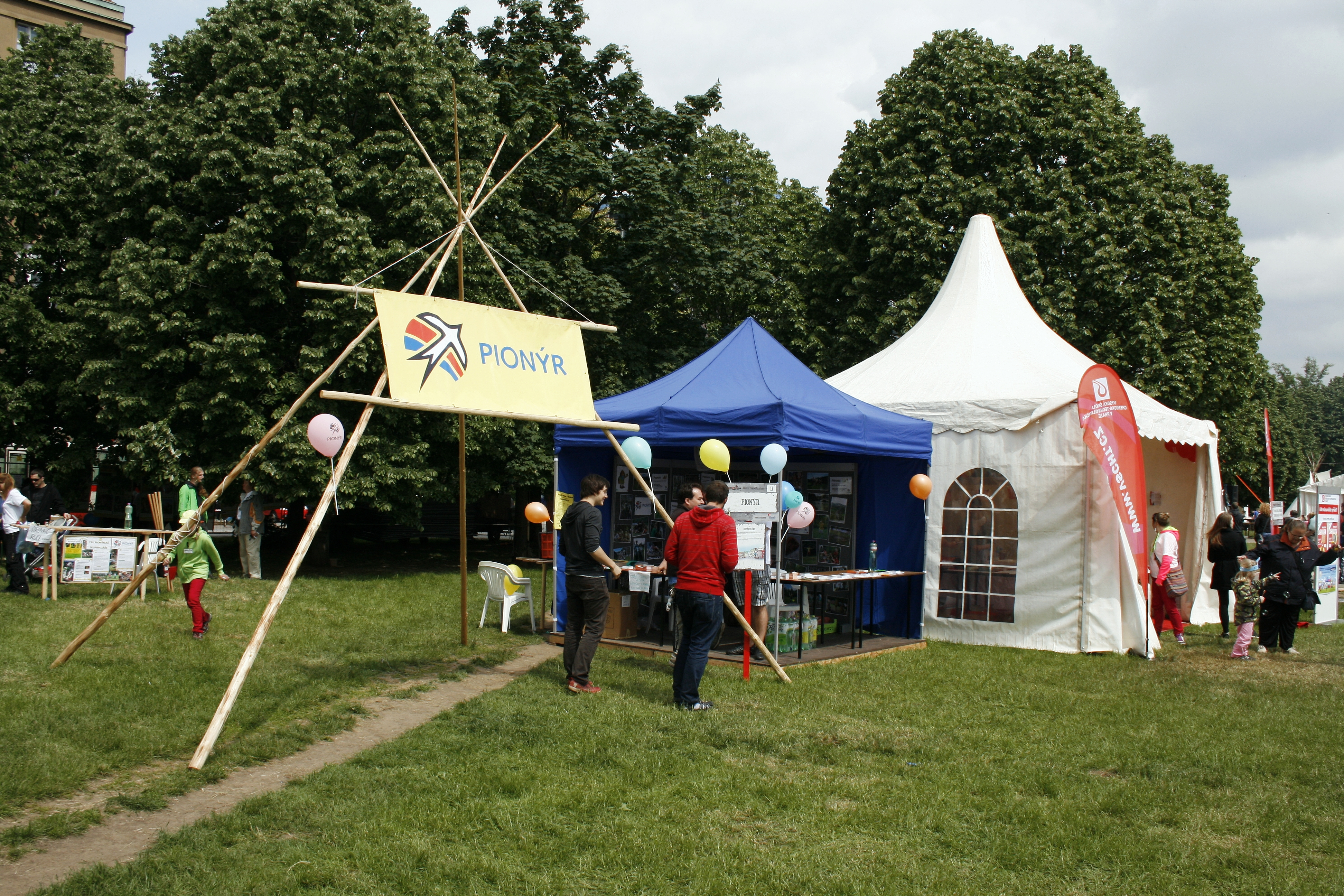 Česky: Praha, Vítězné náměstí - Bambiriáda 2013